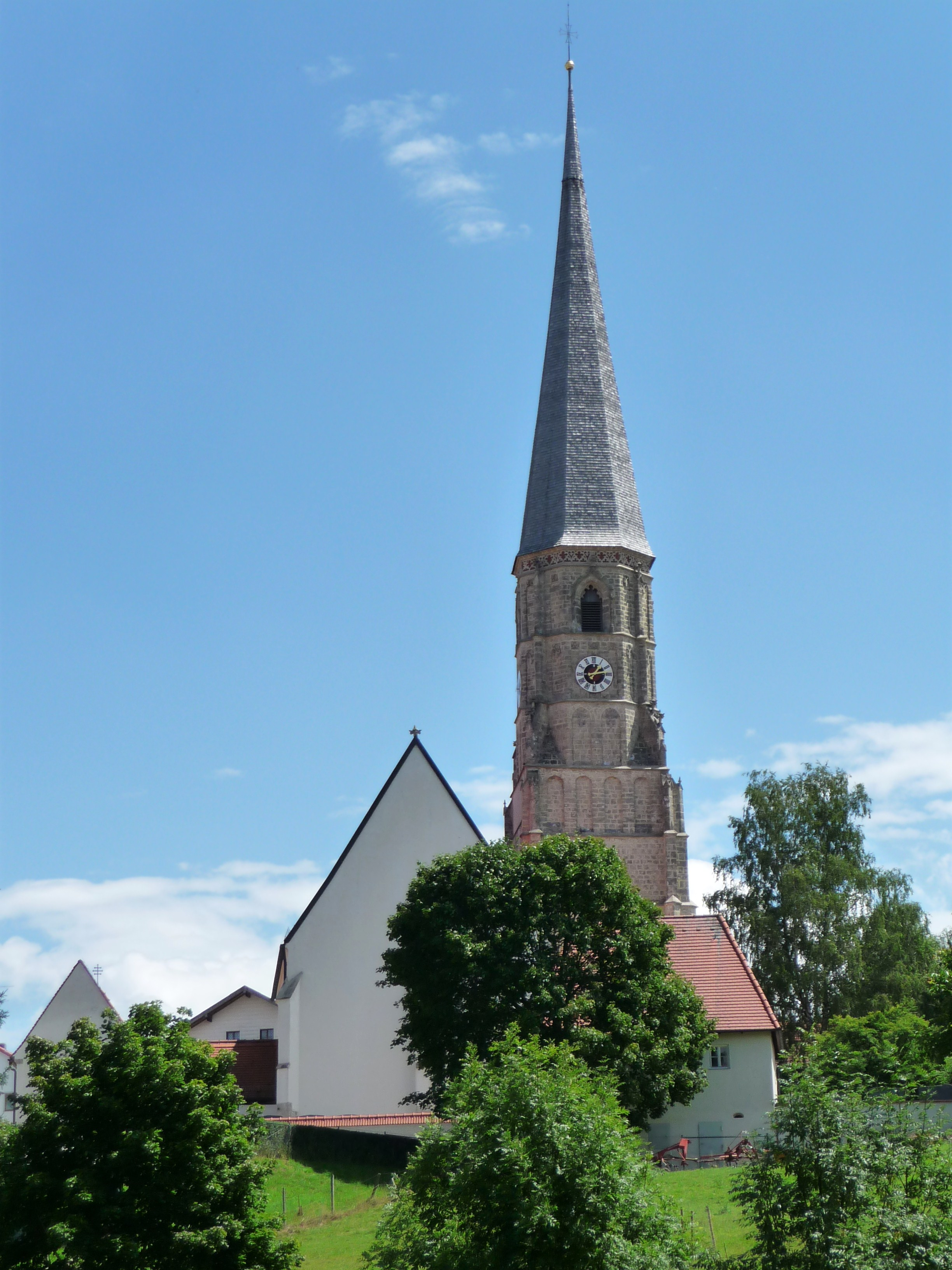 Die Pfarrkirche St. Alban in Taubenbach